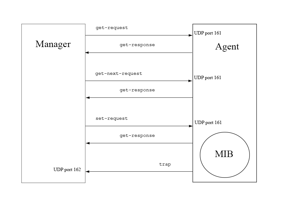 Interazione Snmp